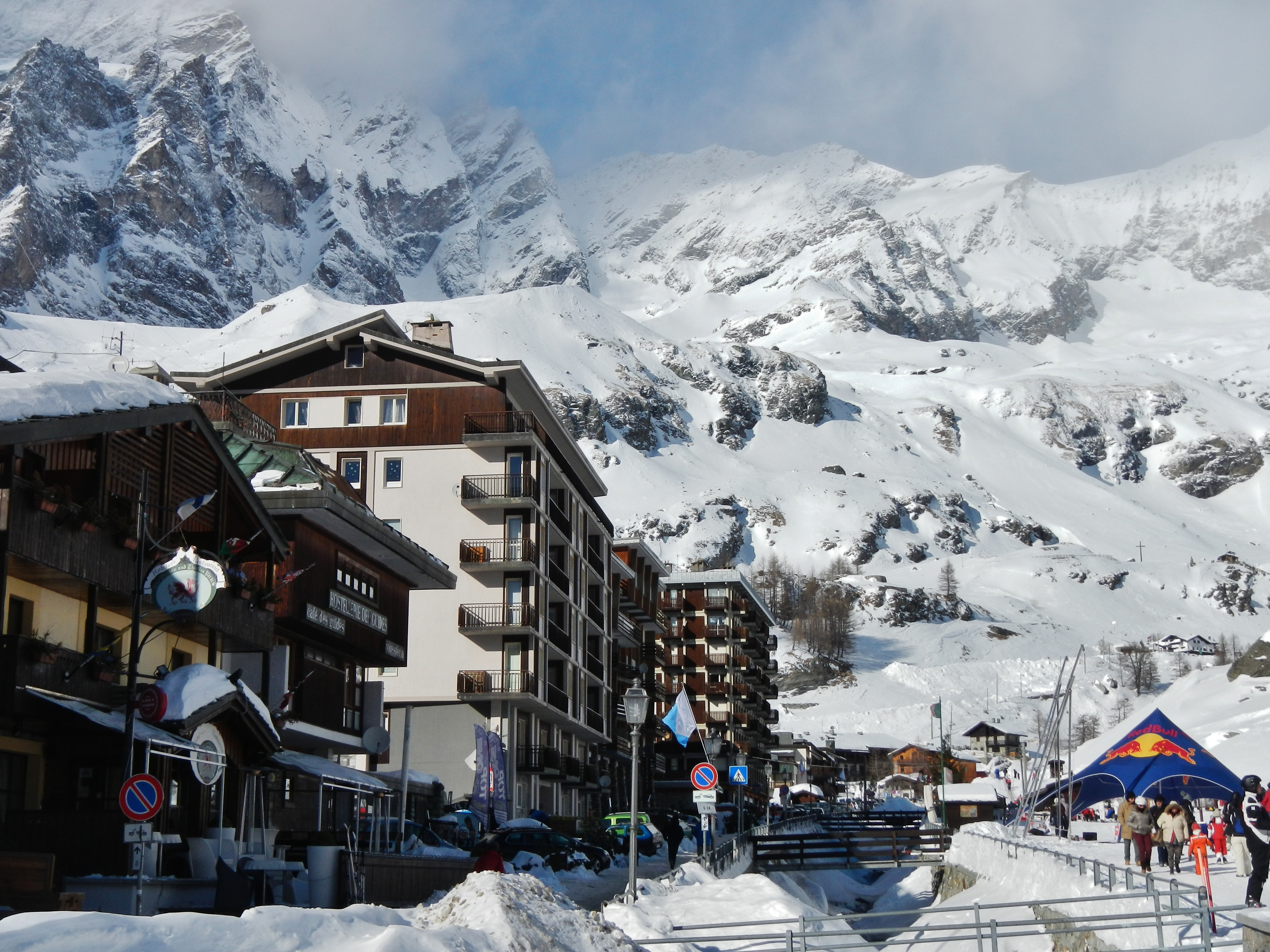 Breuil-Cervinia